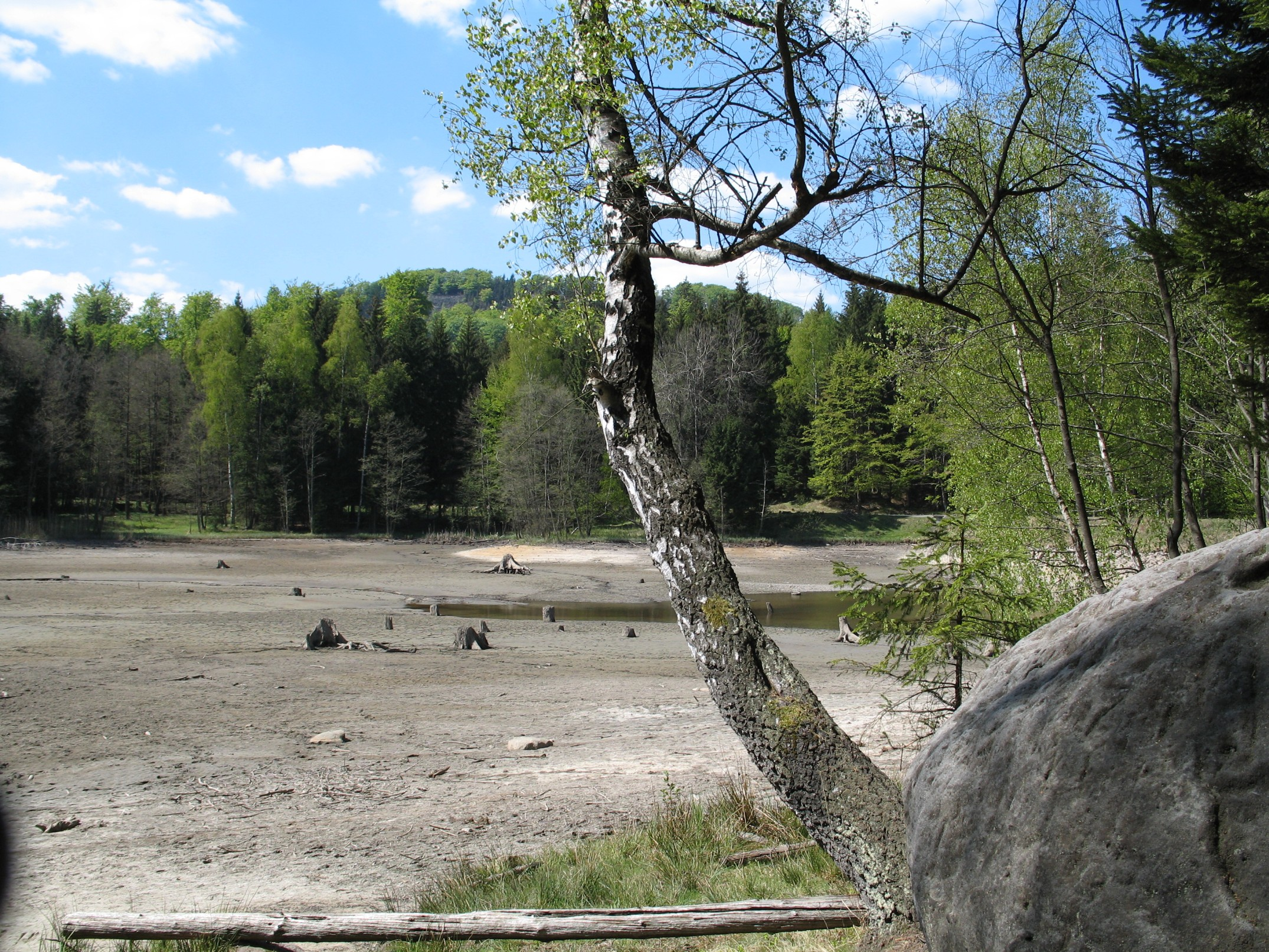 Vypuštěný Velký rybník na jaře 2007 I